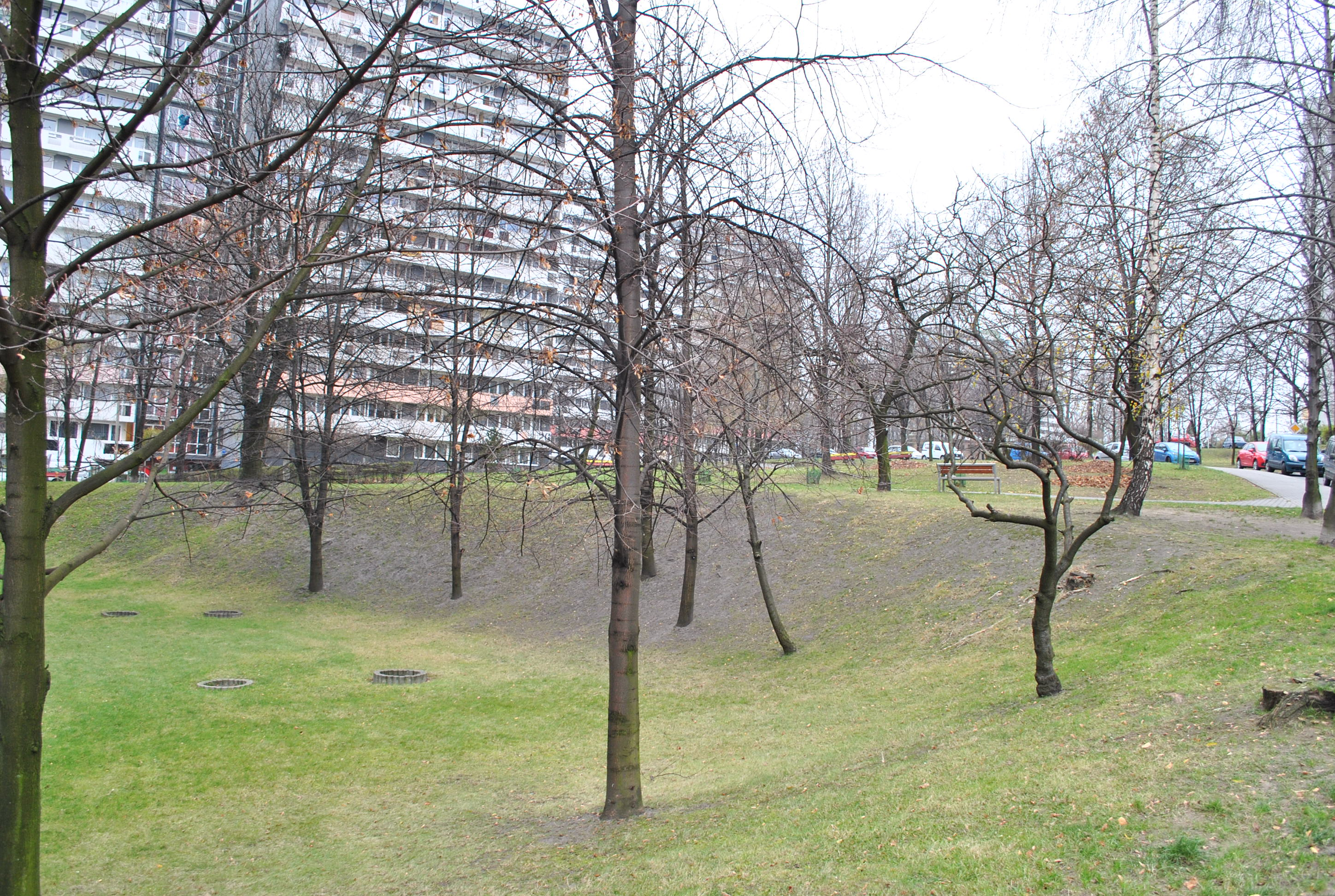 Katowice, Osiedle Tysiąclecia. Sztuczna skarpa w pobliżu ul. Chrobrego